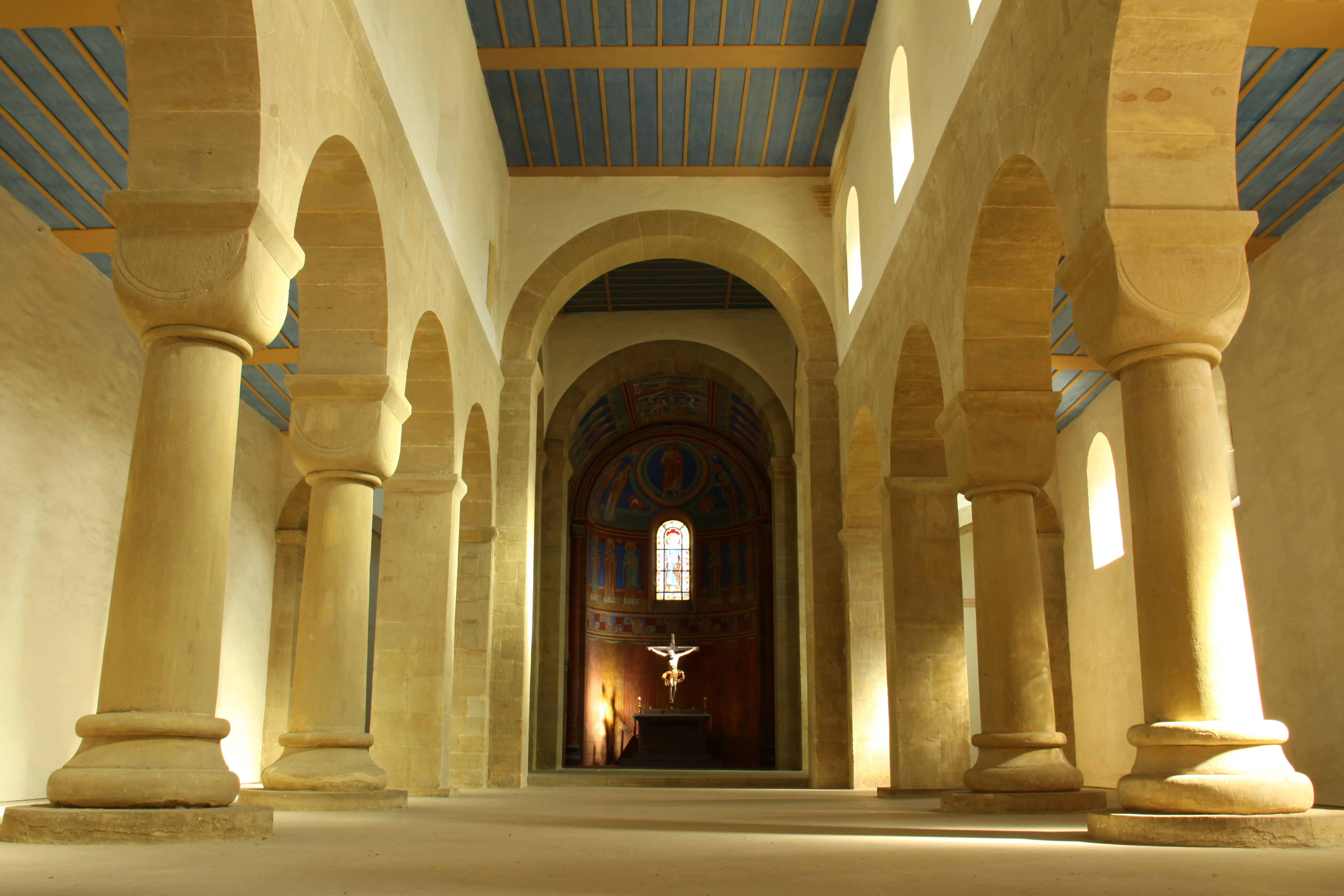 Kleine Comburg- Romanische Kirche, Innenraums